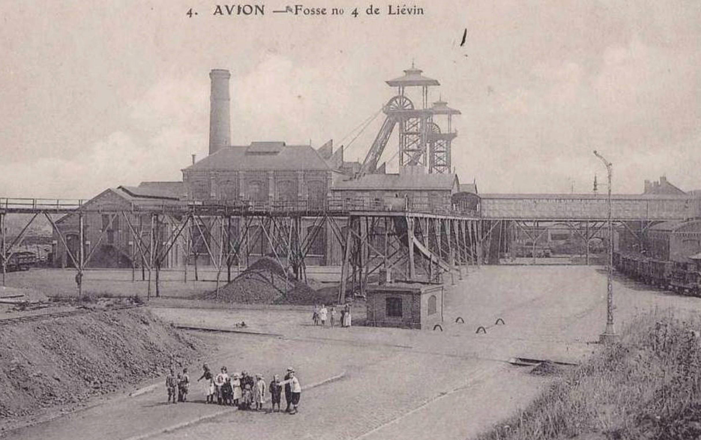 La Fosse n° 4 - 4 bis de la Compagnie des mines de Liévin était un charbonnage constitué de deux puits situé à Avion, Pas-de-Calais, Nord-Pas-de-Calais, France.